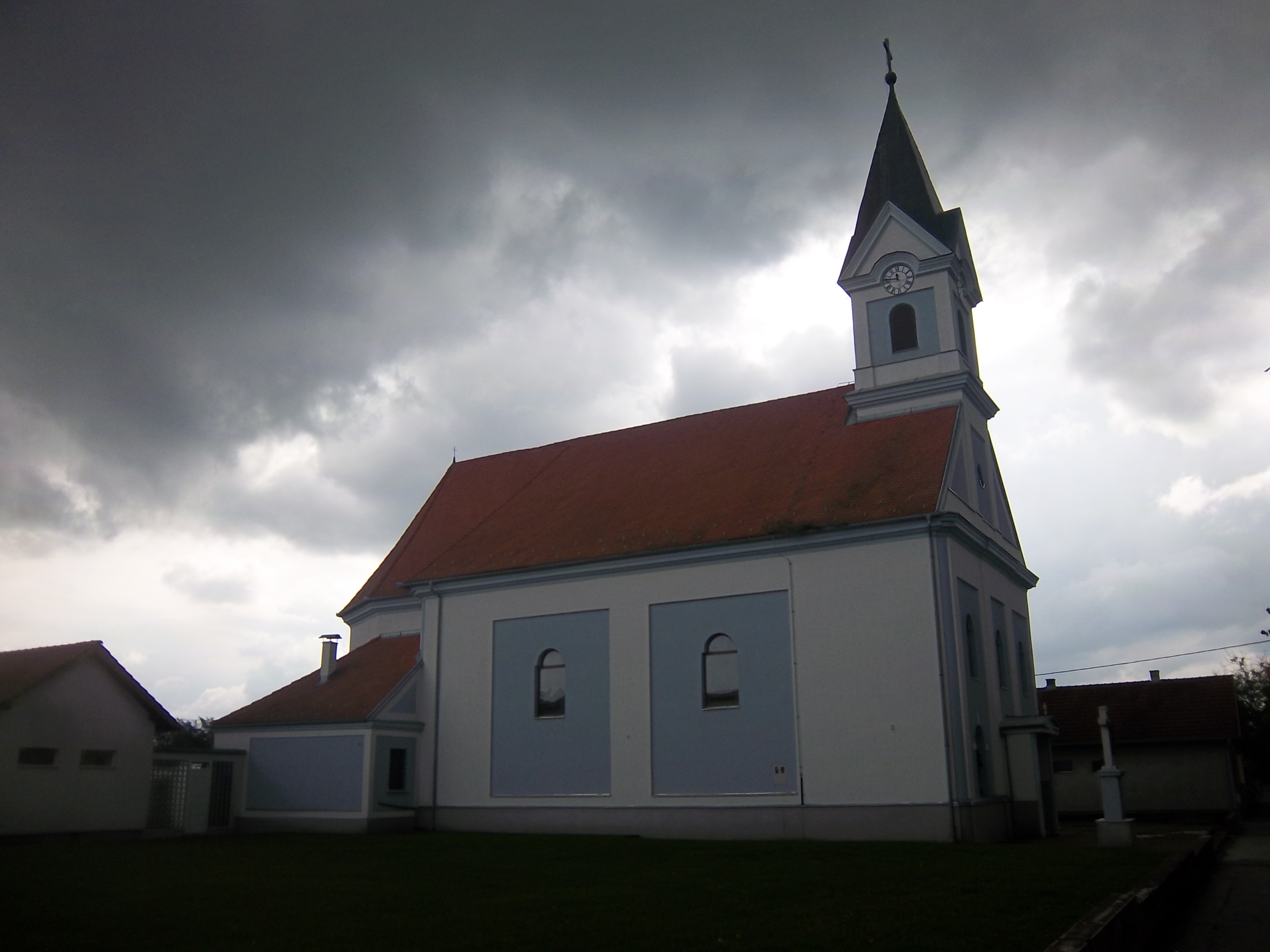 Српски (ћирилица): Римокатоличка црква у Илачи (Република Хрватска)